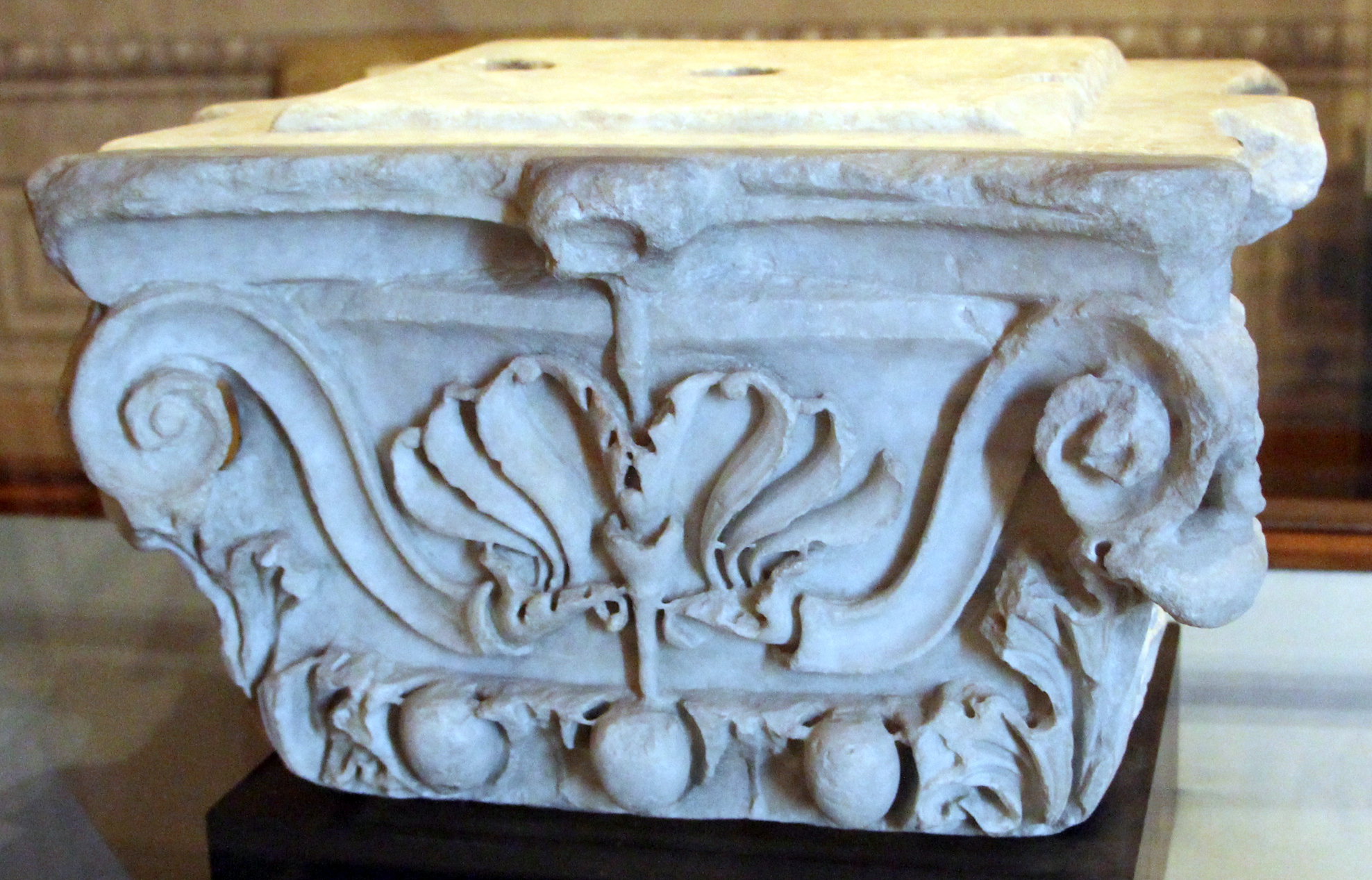 Villa medicea di Cerreto Guidi - MIBAC The making of this document was supported by Wikimedia CH. (Submit your project!) For all the files concerned, please see the category Supported by Wikimedia CH. This is a photo of a monument which is part of cultural heritage of Italy.